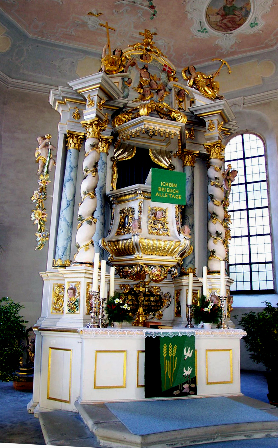 Der Kanzelaltar